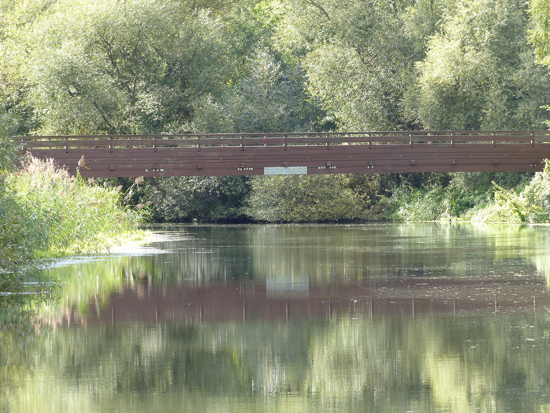 Okerbrücke Melverode Schrotweg, Absicht von Norden.